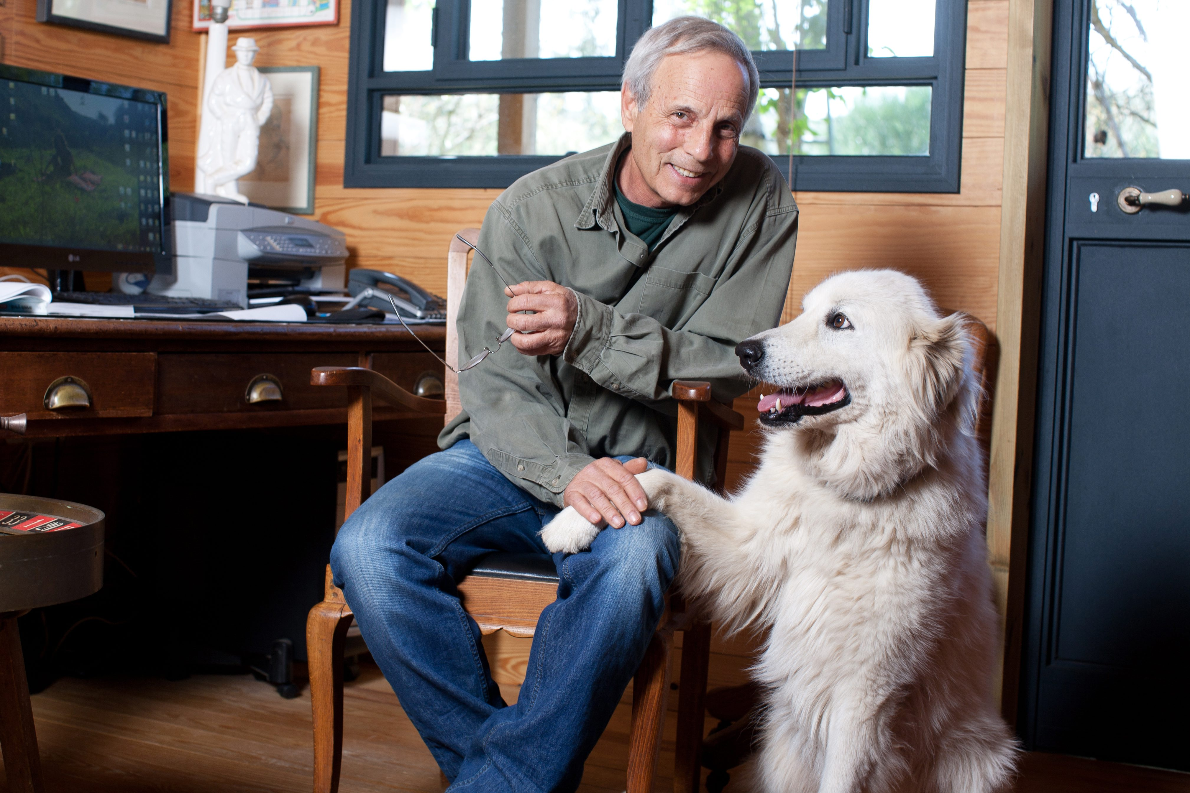 בחדר העבודה של חמיצר